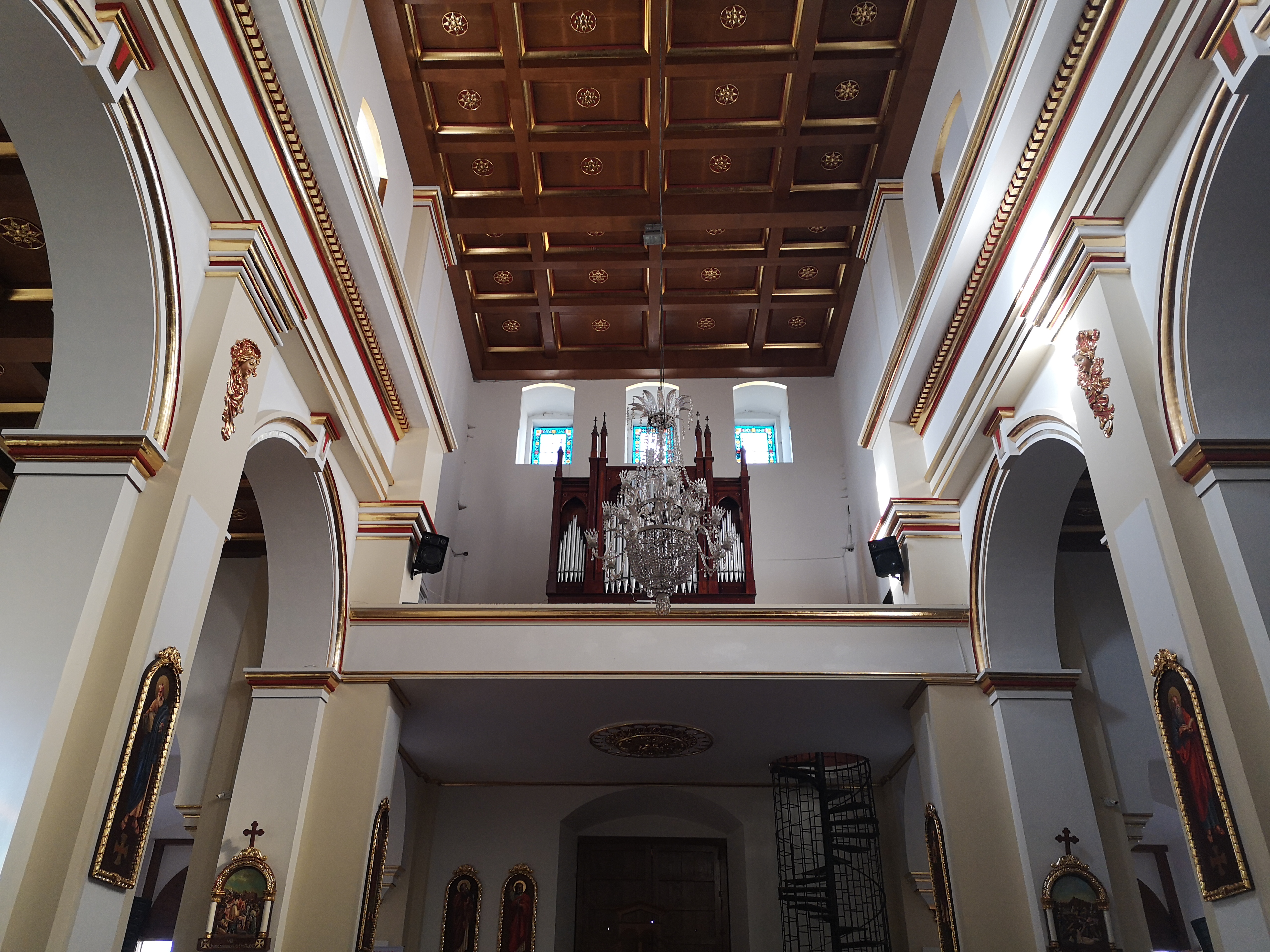 Catedral de Santa Rosa de Osos